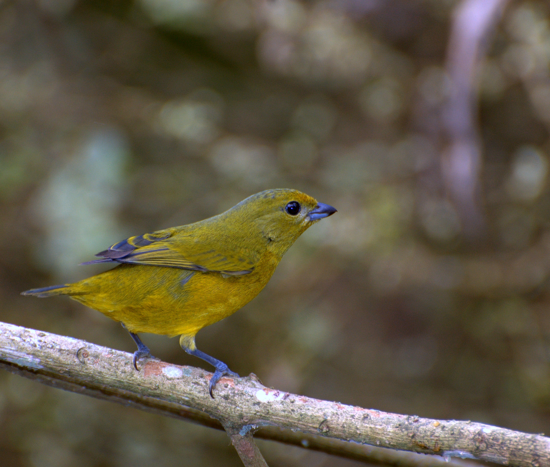 Vale do Ribeira - Registro-SP - Brasil